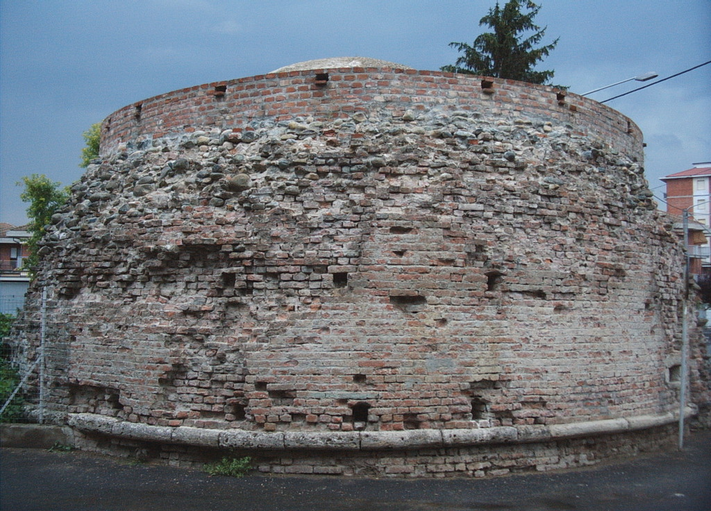 Resti di uno dei torrioni di fortificazione del 1500